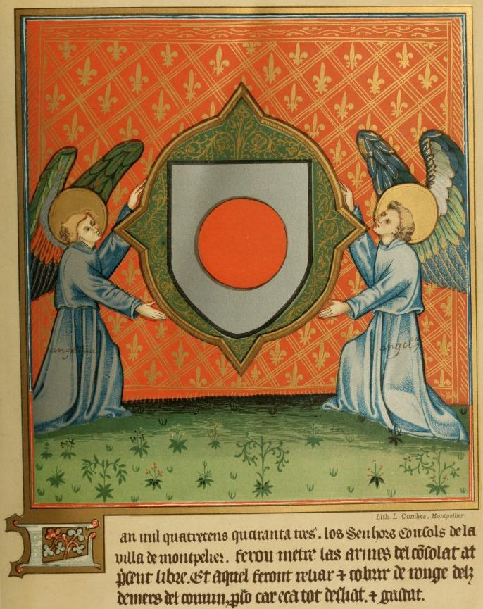 Armes de Montpellier (1443) dans le Liber instrumentorum memorialium